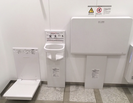 多目的トイレ，親子トイレに設置される備品